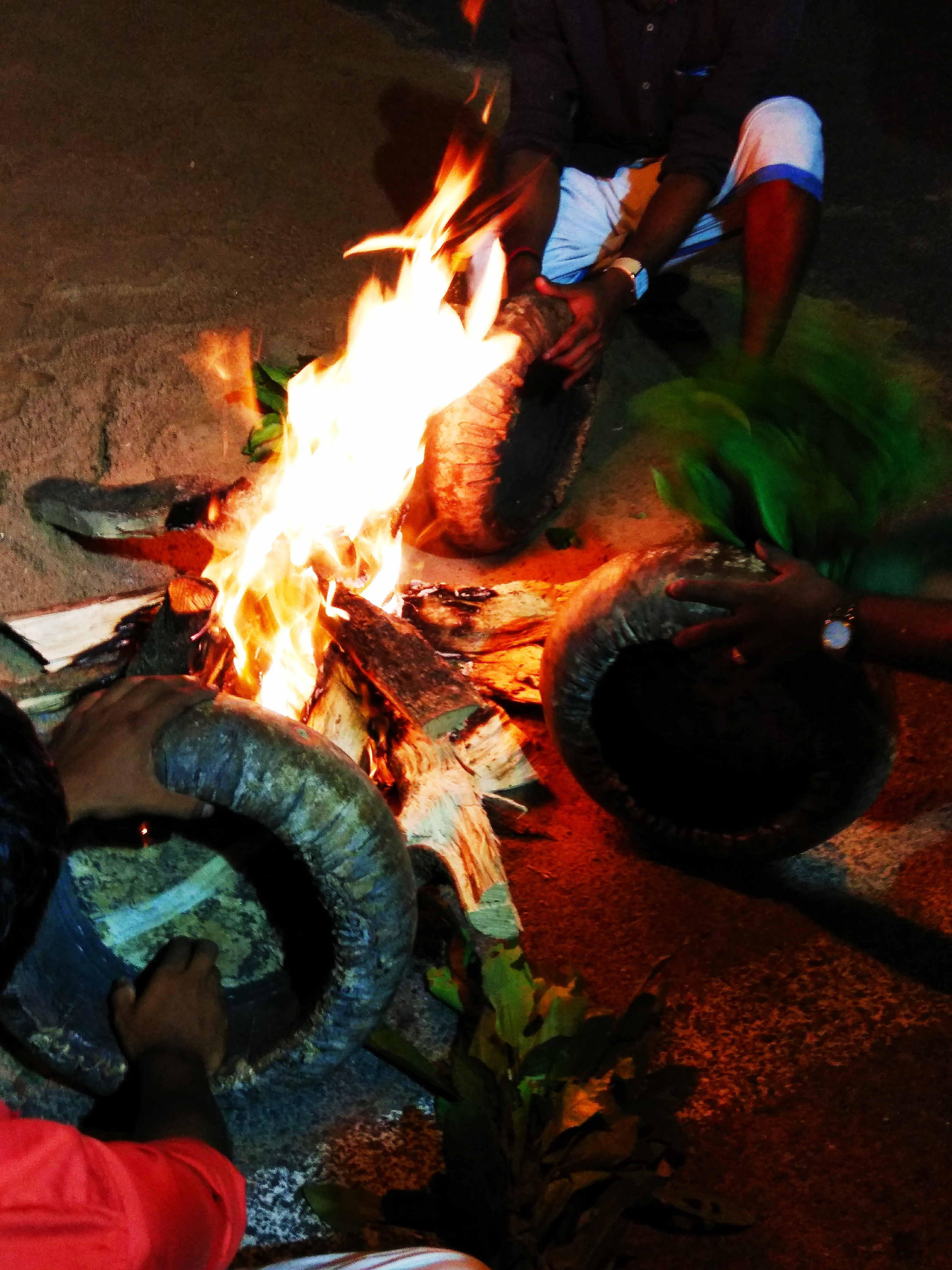 തപ്പ് വാദ്യോപകരണം ചൂടാക്കുന്നു.